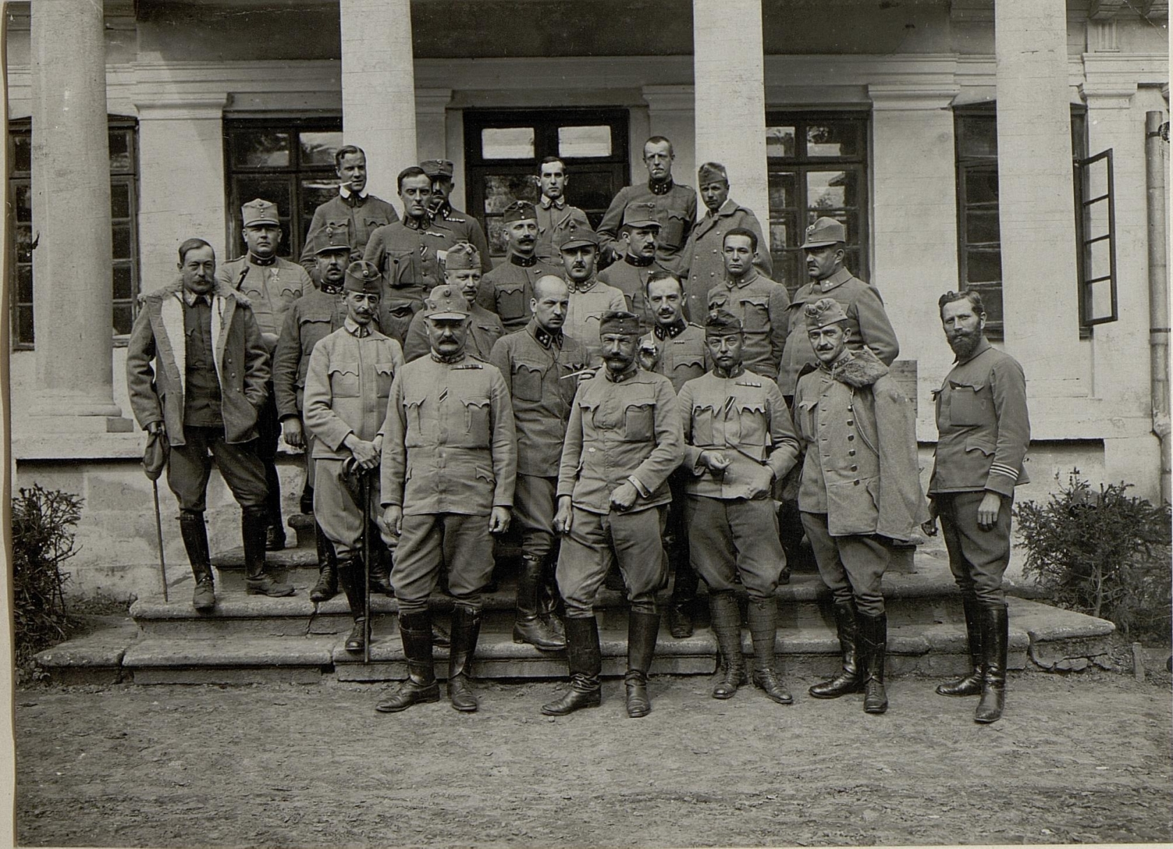 Stab der 32. Infanteriedivision, Erste erste Reihe links, Generalmajor Rudolf Ritter von Willerding, Kommandant der 32. Infanteriedivision, zweiter erste Reihe von links, Major Janda, Generalstabschef der 32. Iinfanteriedivision, 3. Oberst Rabl Kommandant der 32. Feldartilleriebrigade, 24.IX.1916.